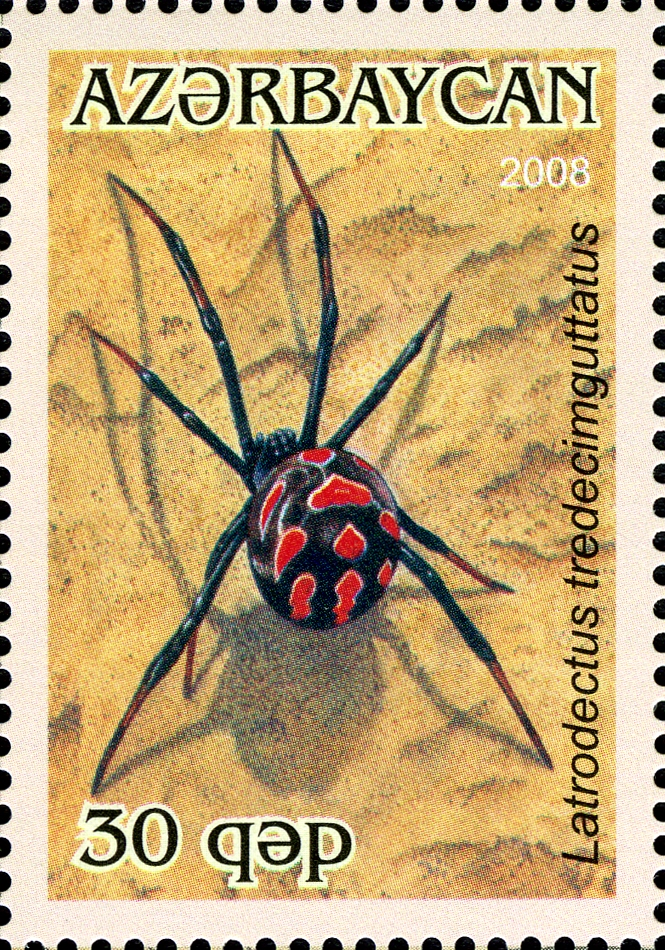 Hörümçəkkimilər.